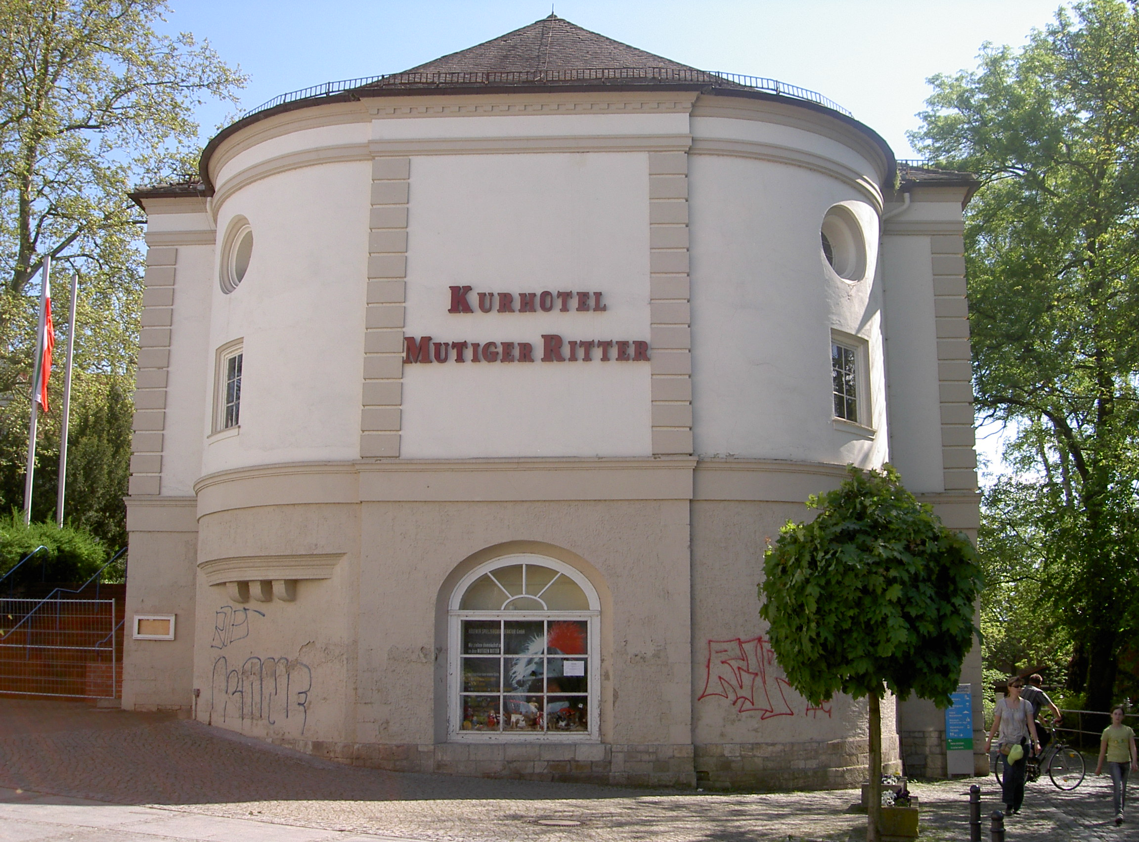 Hotel Mutiger Ritter in Bad Kösen, Anbau mit Tagungssaal (errichtet an Stelle des 1916 abgebrannten Nebengebäudes)